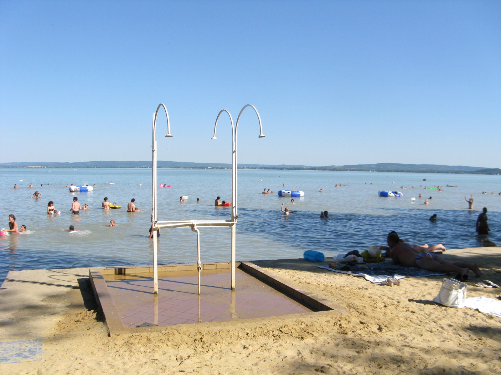 Ülesvõte tehtud Révfülöpi rannas Ungaris. Pildil avaneb vaade Balatoni järvele.